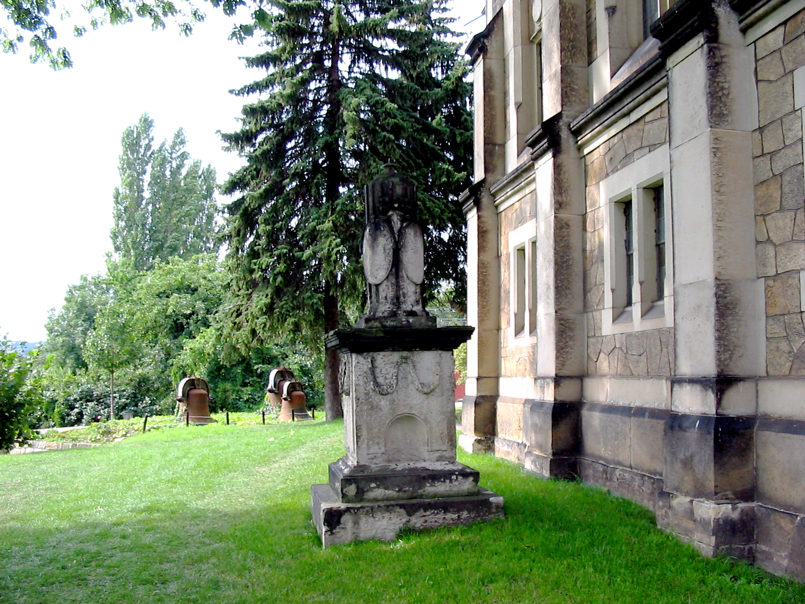 Unleserliches klassizistisches Grabmal hinter der Kirche, Kirchhof, dazu alte Glocken